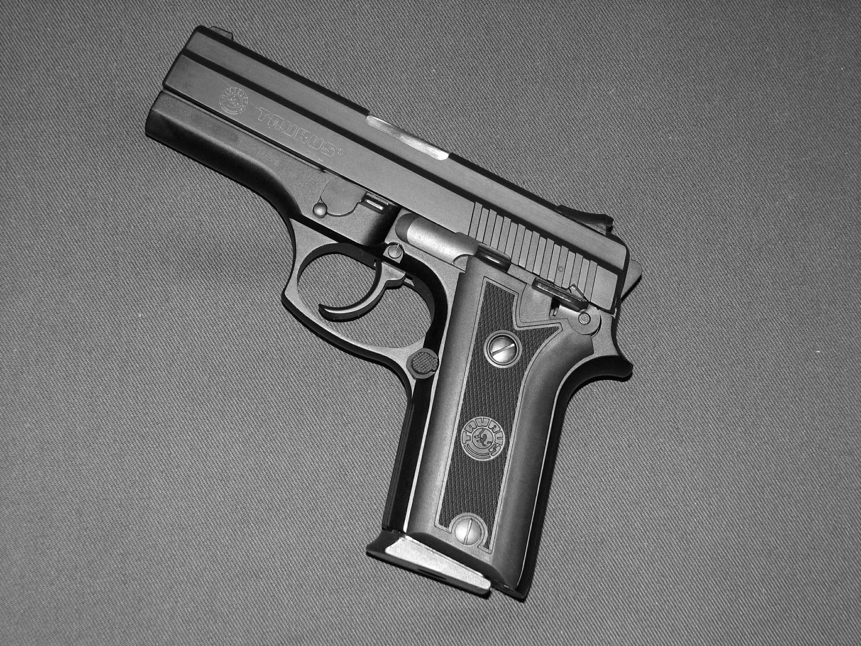 Picture taken by the uploader- brazilian pistol PT 940C - Taurus